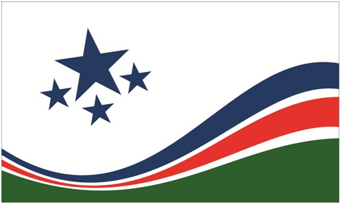 Bandera Monte Oscuridad